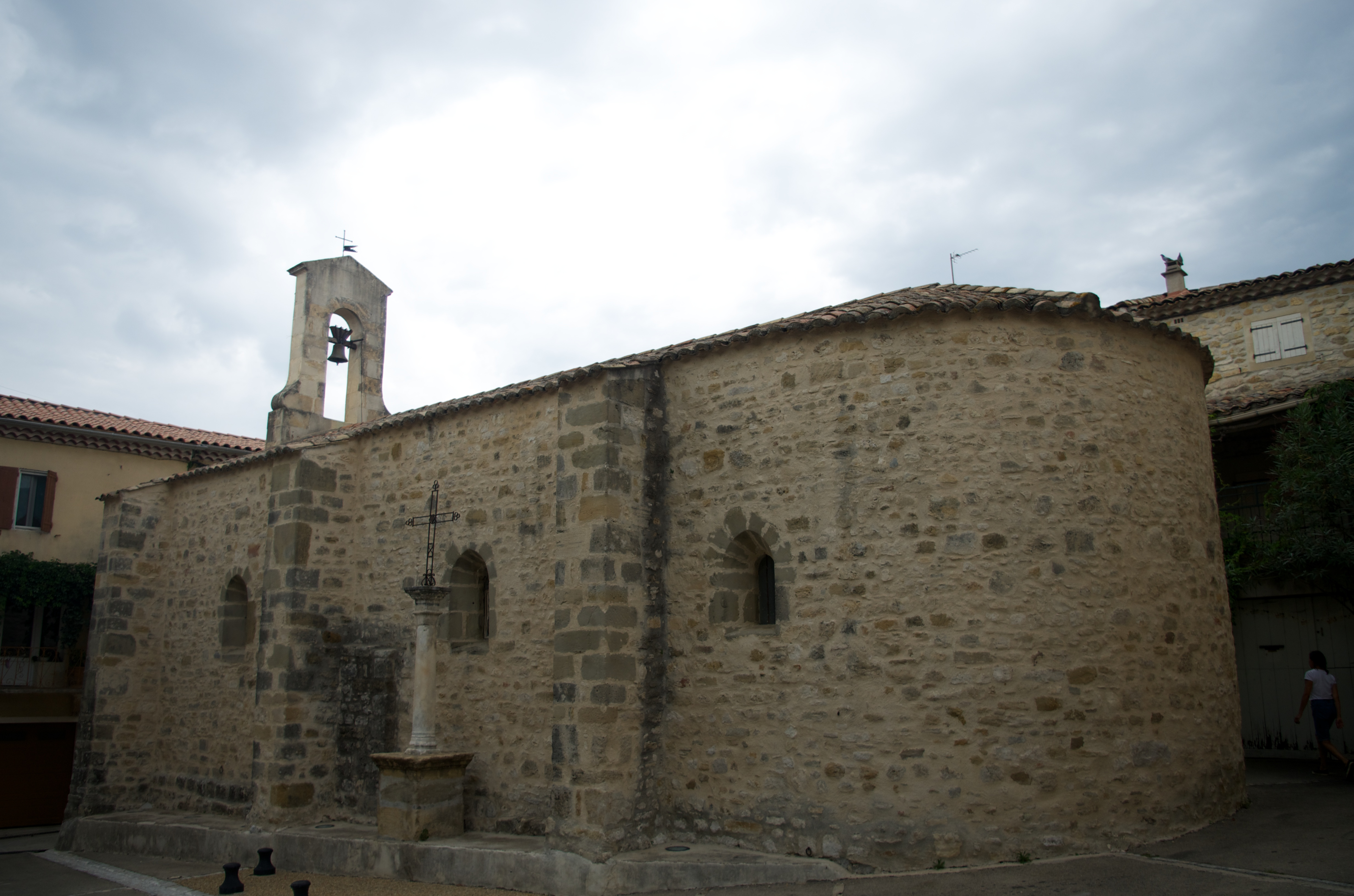 Vue arrière du bâtiment